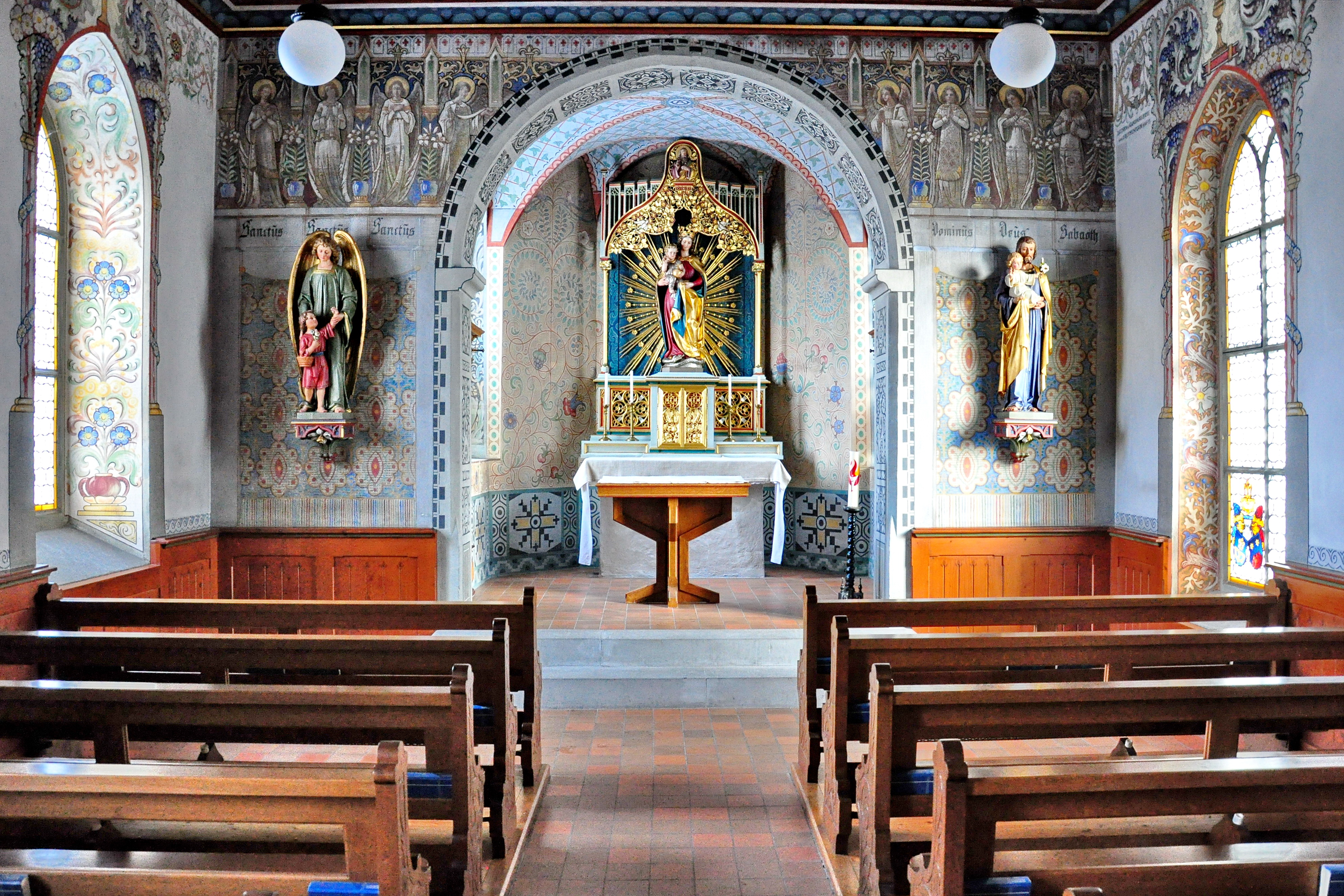 Liebfrauenkapelle in Rapperswil (Switzerland)